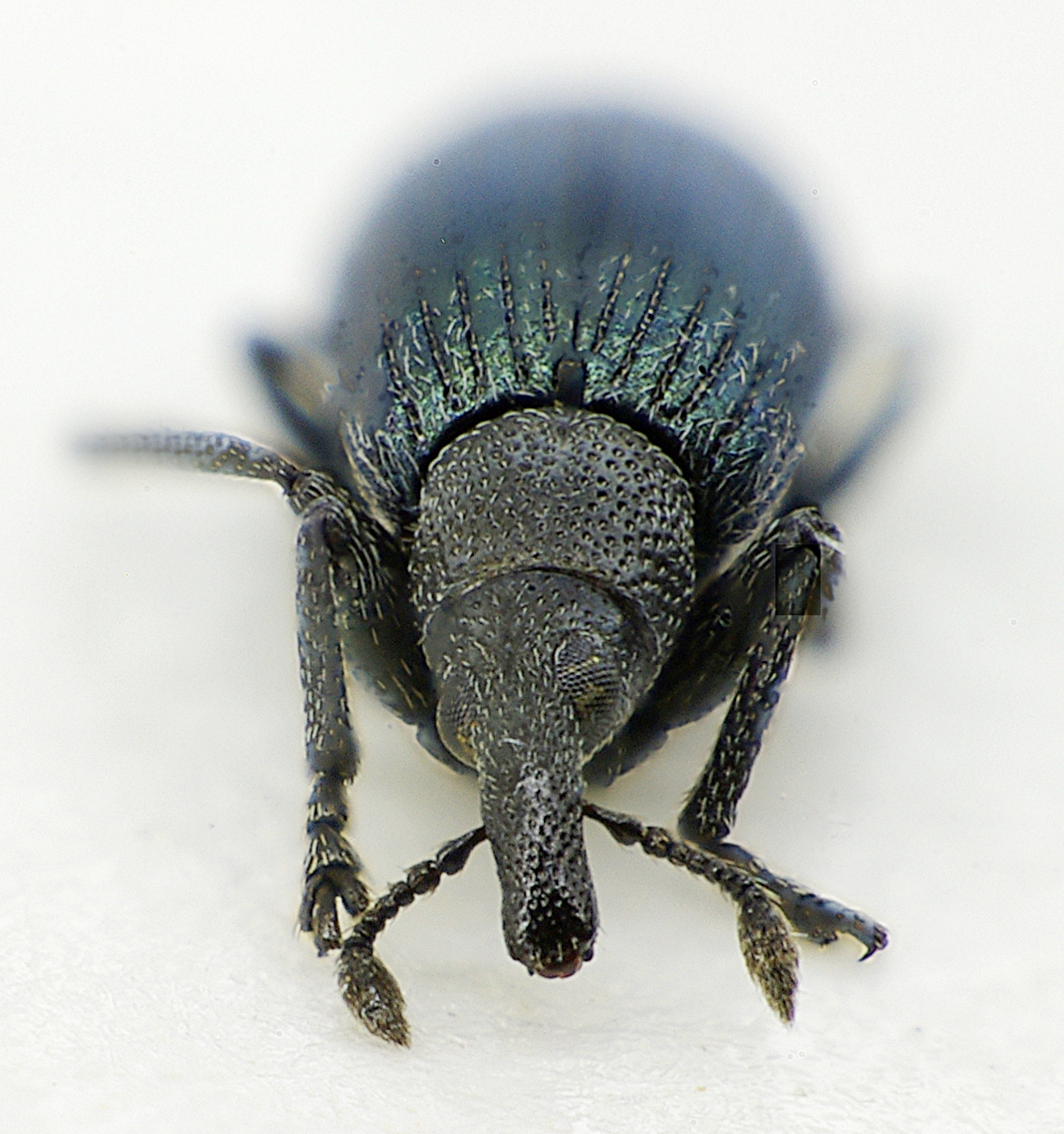 Perapion violaceum aus Frankreich bei Muhlouse am15. April 2013 Vorderansicht